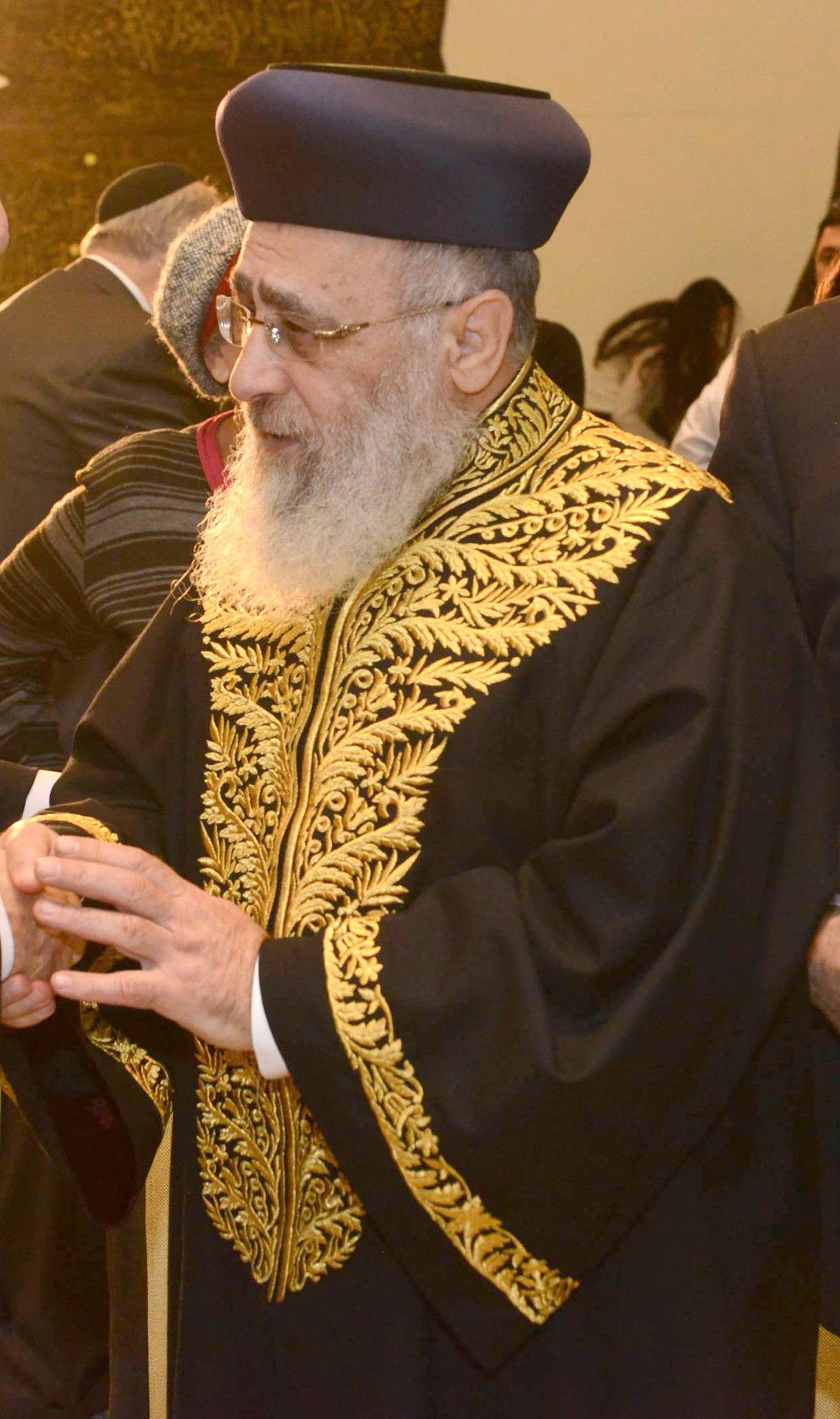 אירוע לציון 70 שנה לאנציקלופדיה התלמודית במשכן נשיא מדינת ישראל הרב יצחק יוסף